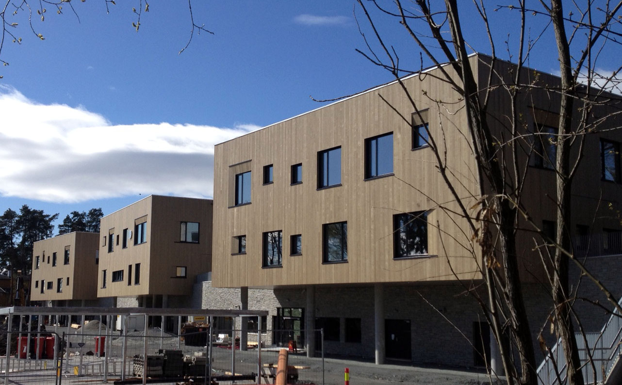 Nye Bjørnsletta skole, Oslo 2014